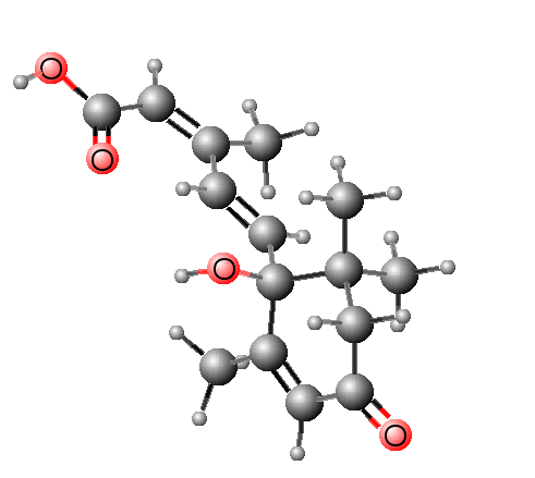 Model molekuly kys. abscisová¡ (cis,trans,S)